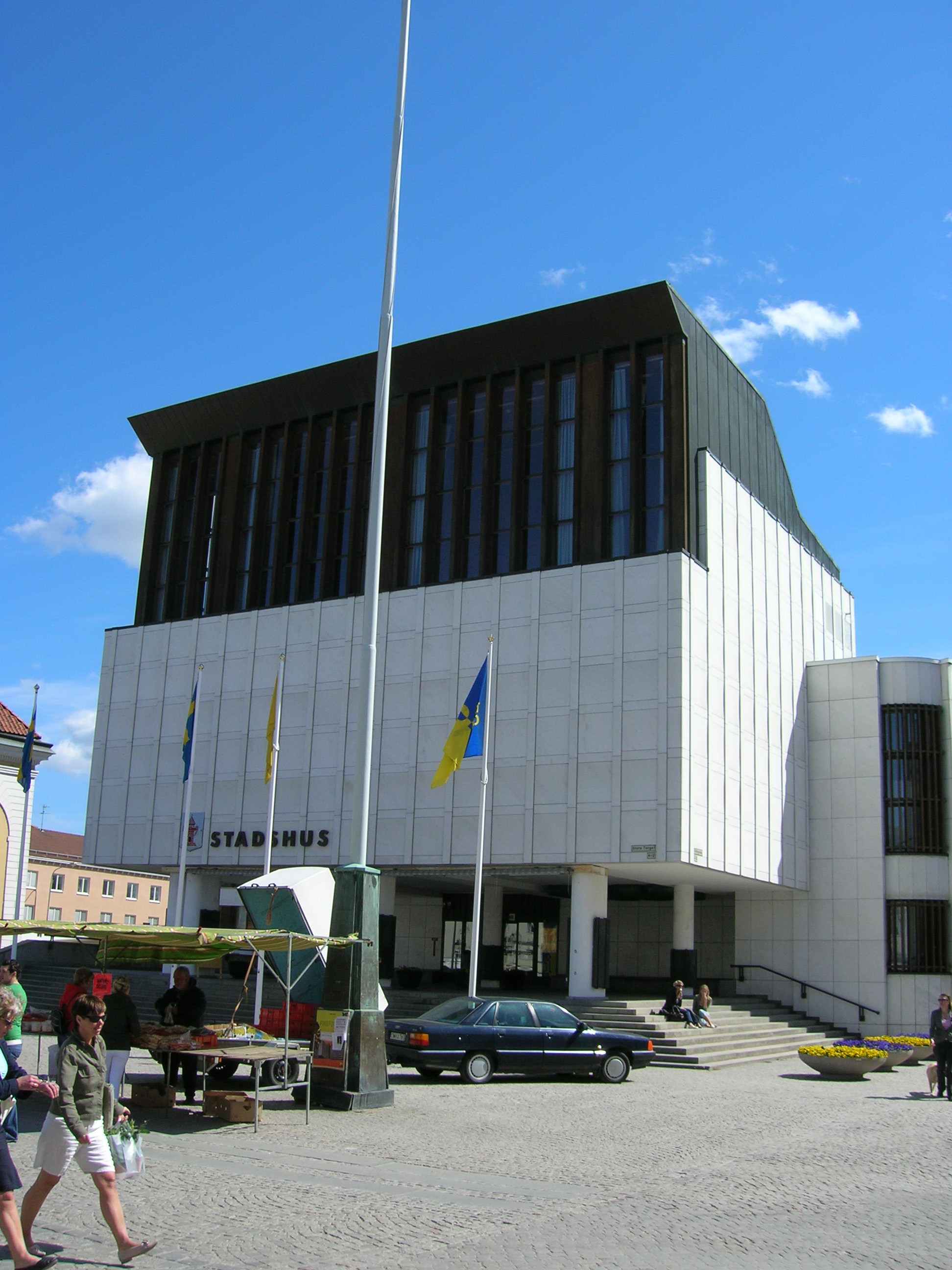 Nyköpings stadshus 13 maj 2006. Fotograf: Niklas Nordblad